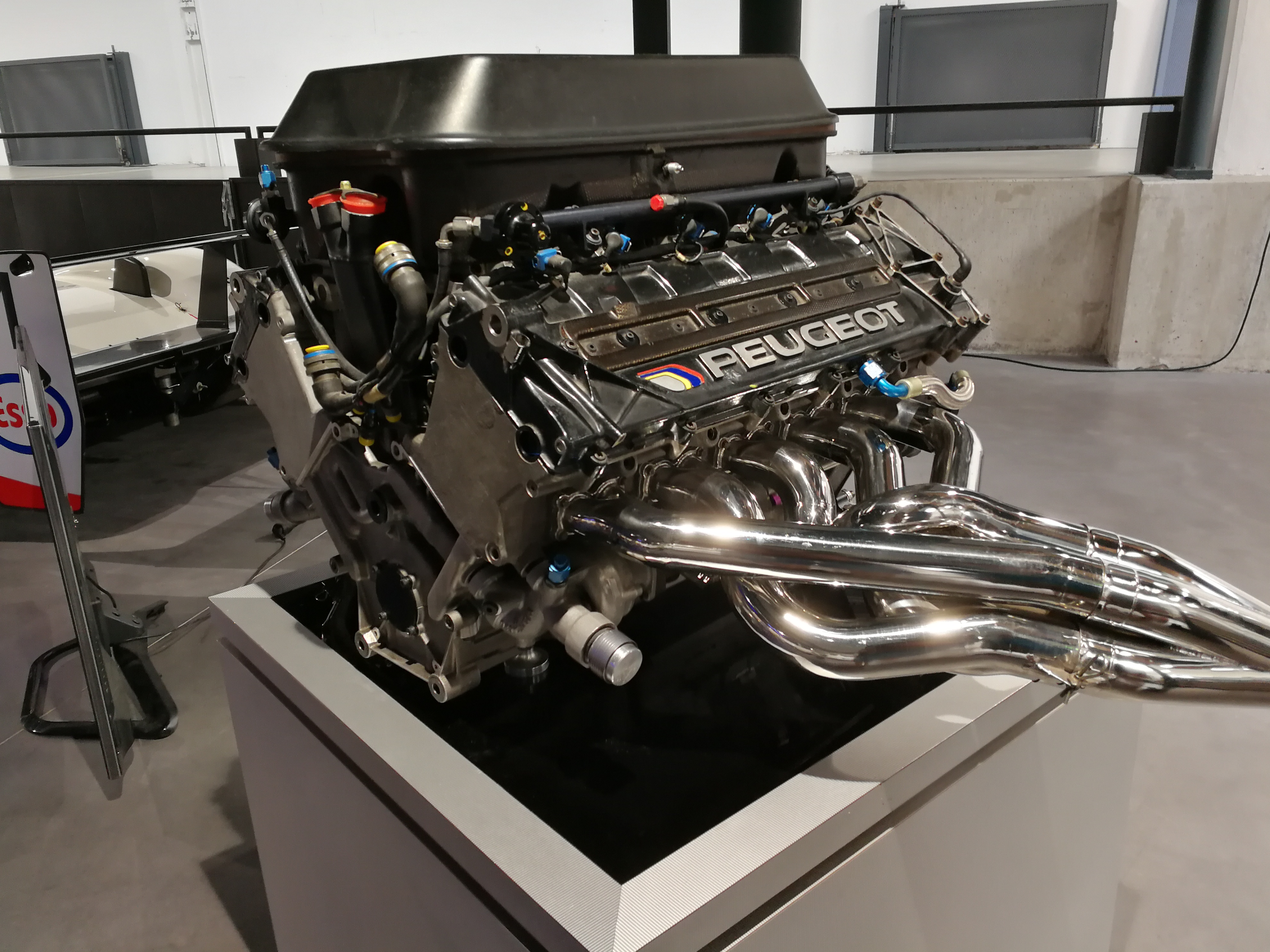 Moteur diesel V10 de la Peugeot 905